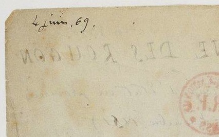 Le verso de la 1ère page du manuscrit de La Fortune des Rougon d'Émile Zola conservé à la Biblliothéque Nationale de France.